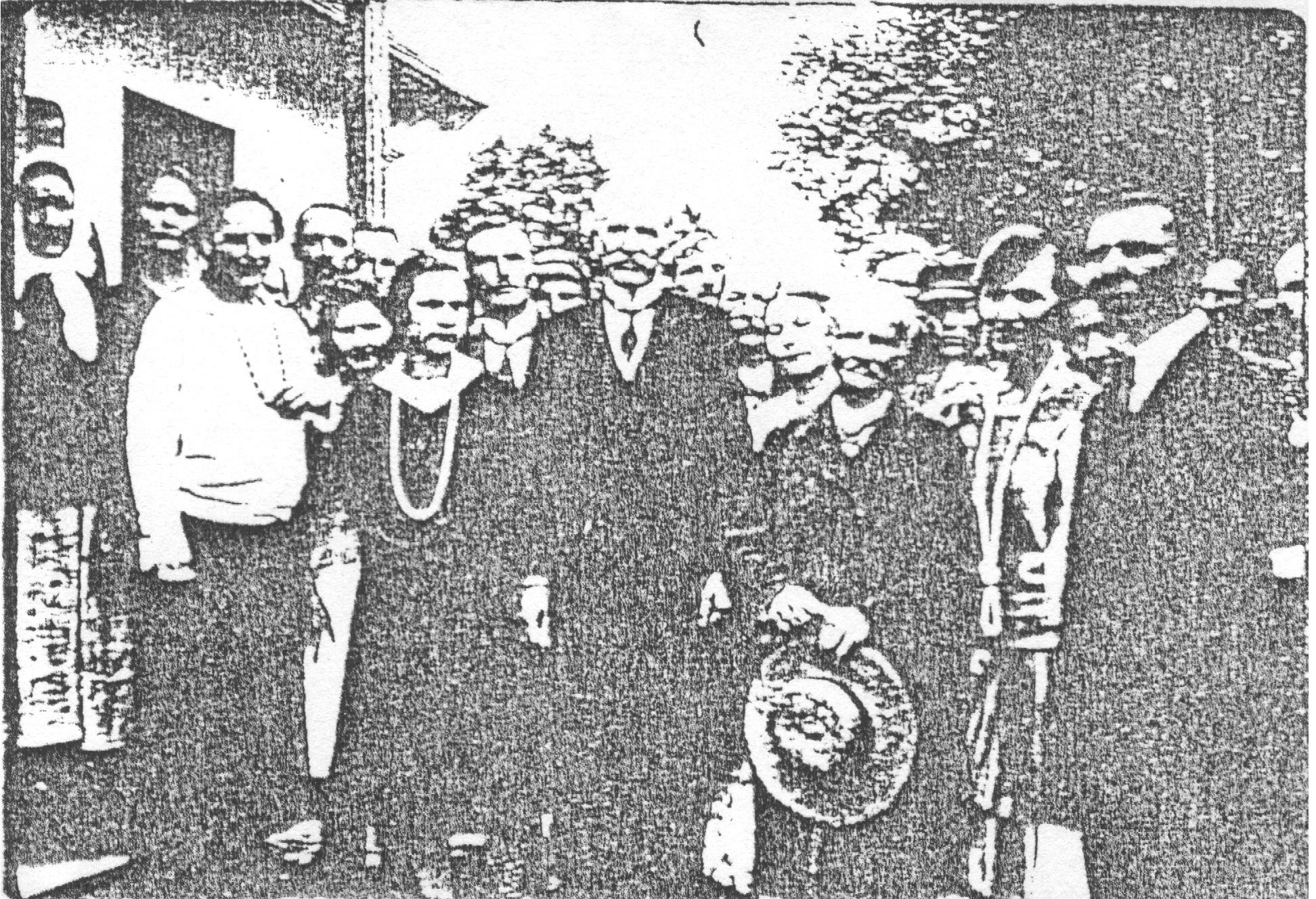 Przyjazd Ignacego Mościckiego do Skierbieszowa 19 czerwca 1927 r.